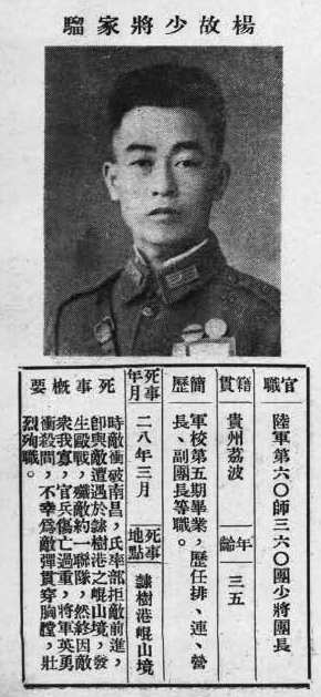 中文（台灣）: 抗戰軍人忠烈錄第一輯中的烈士遺像